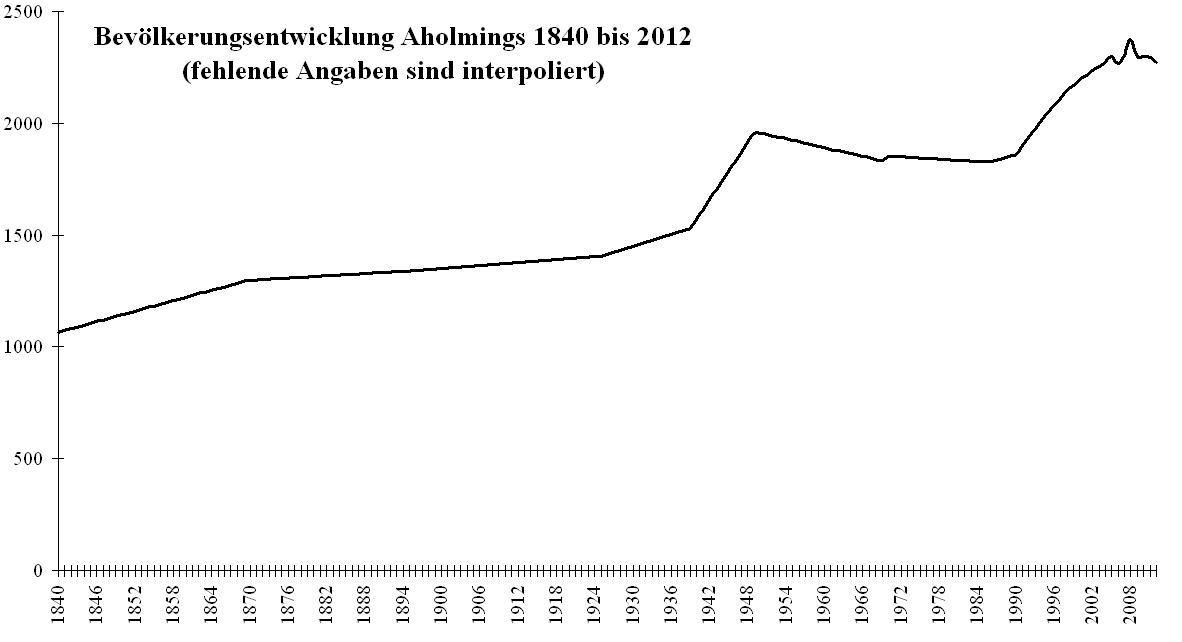 Bevölkerungsentwicklung der Gemeinde Aholming von 1840 bis 2012